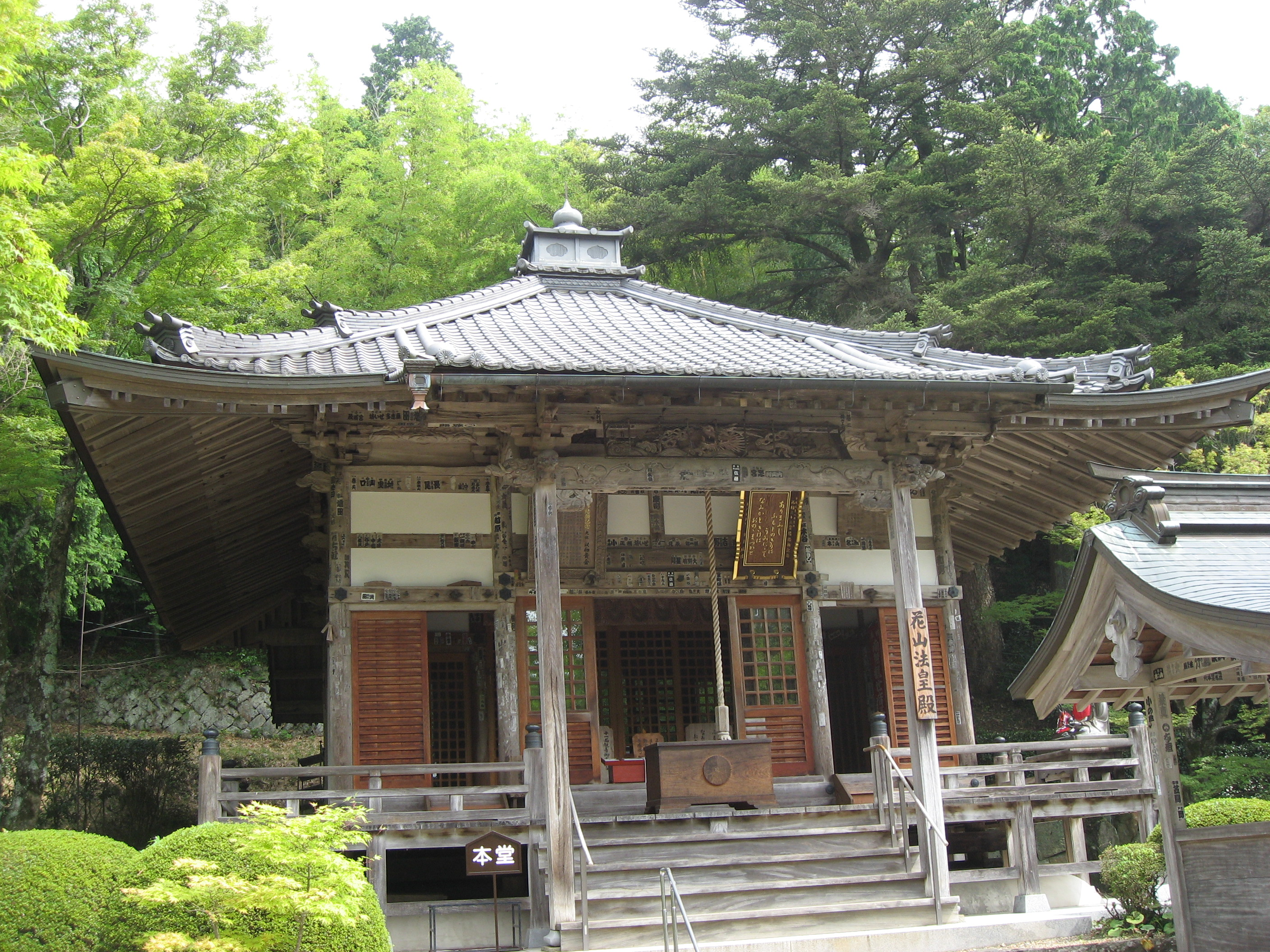 Bodai-ji Temple, Sanda, Hyogo, Japan